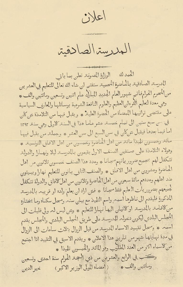 Déclaration d'ouverture du Collège Sadiki, 1 février 1875, Tunis, Tunsie